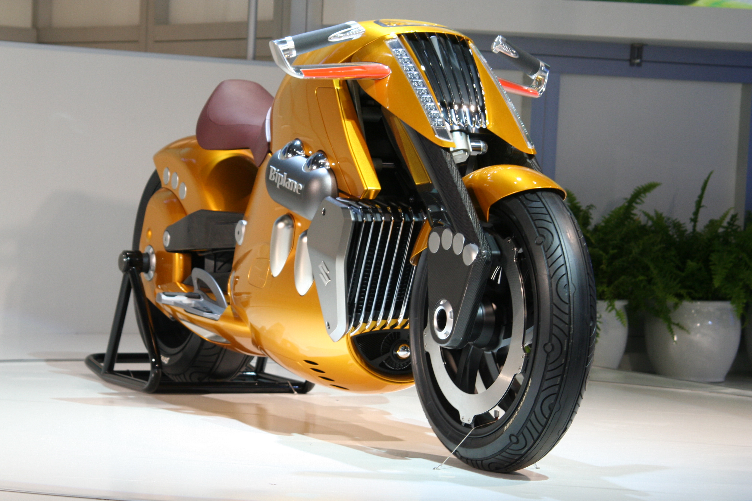 Biplane